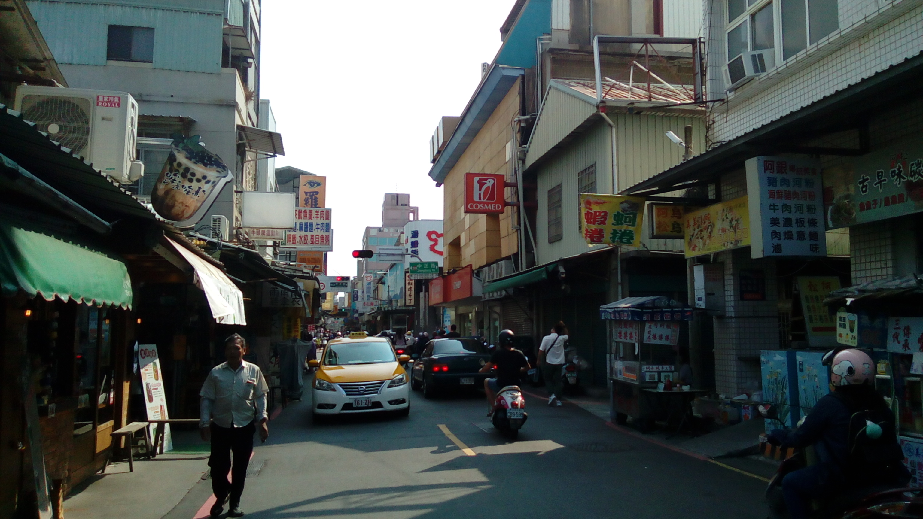 約莫位於西門路和中正路交界一帶